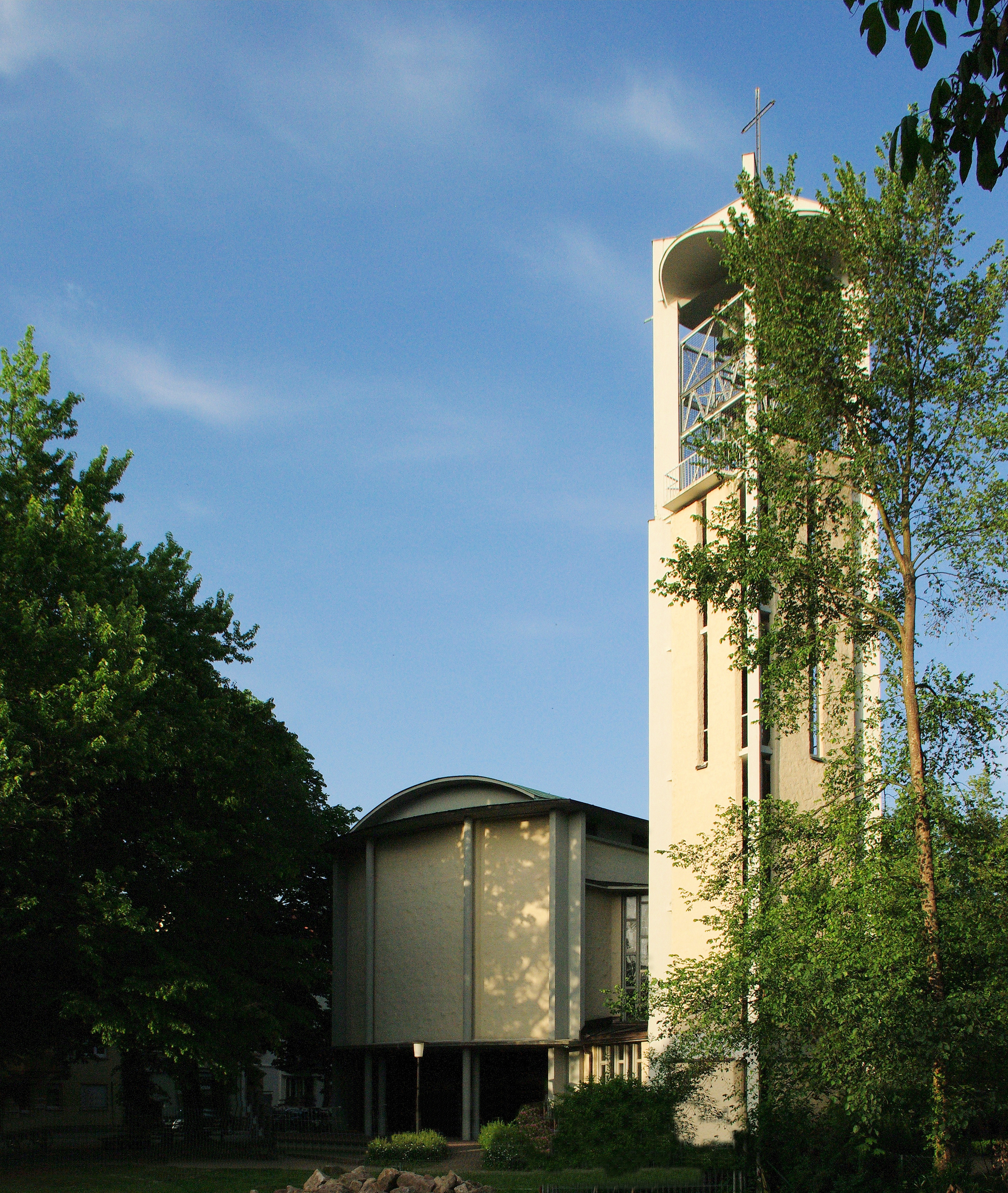 Ludwigskirche